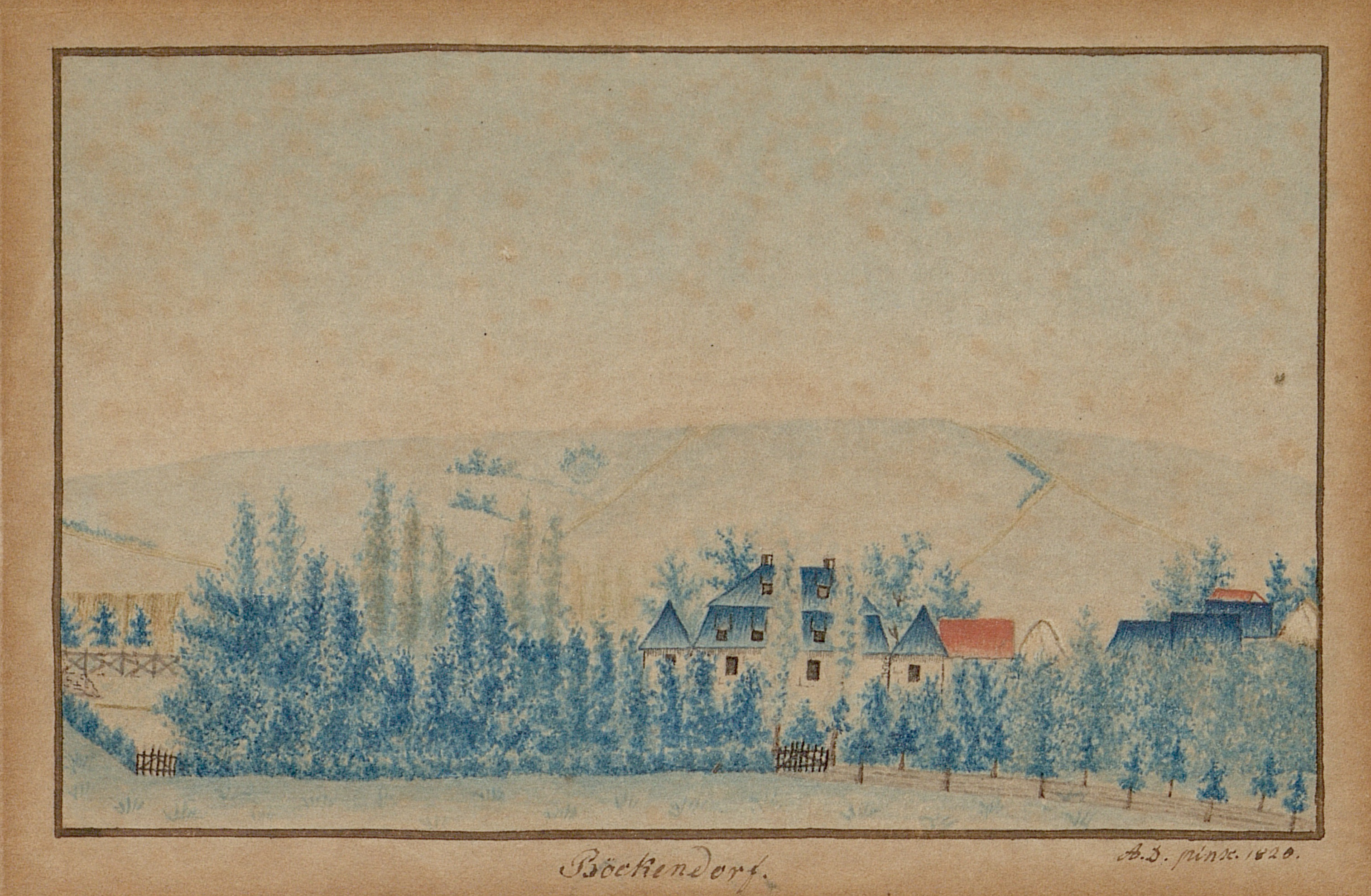 Böckendorf (Bökerhof) – Aquarell von Annette von Droste-Hülshoff